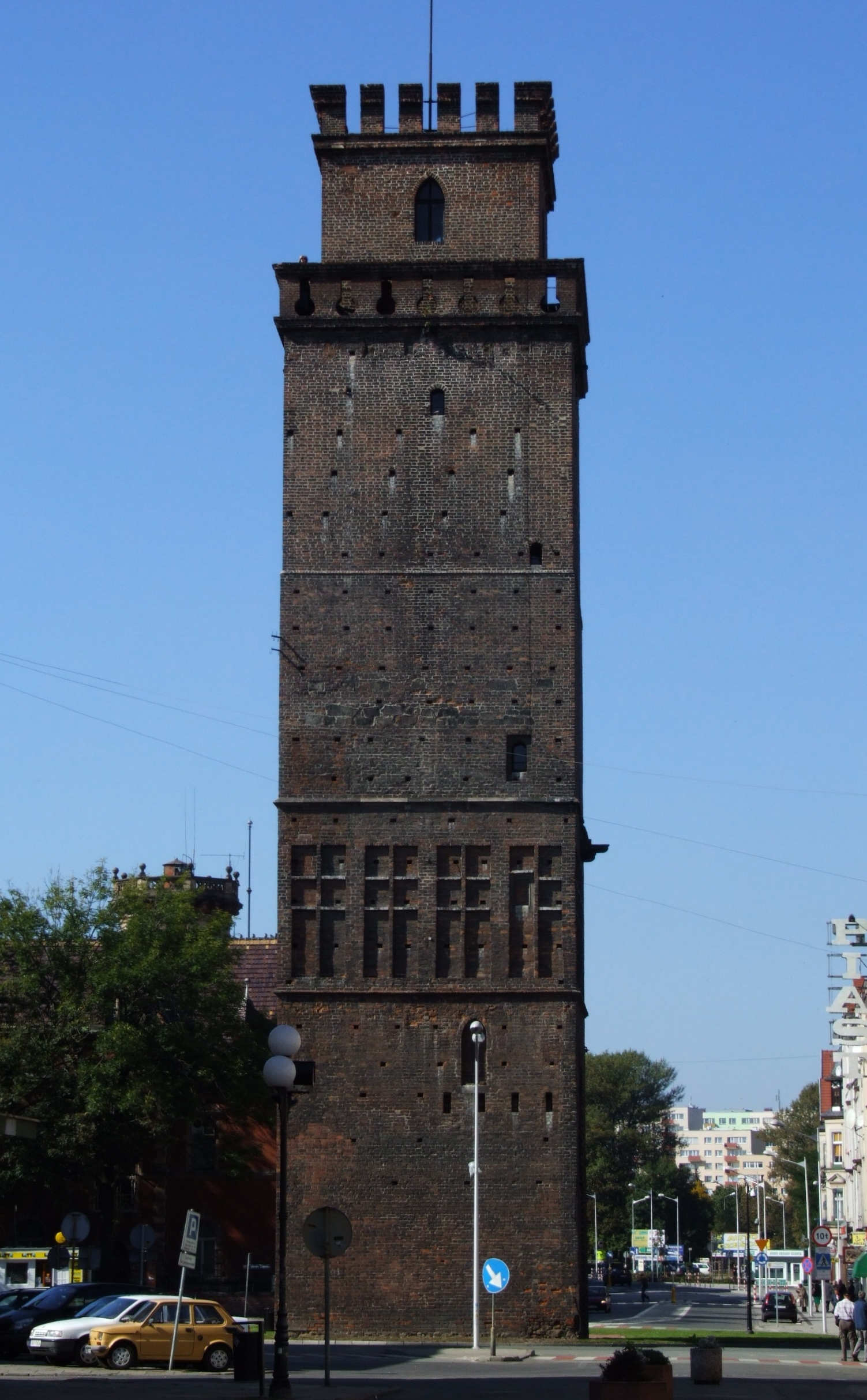 Neisse - Nysa. Wieża Ziębicka